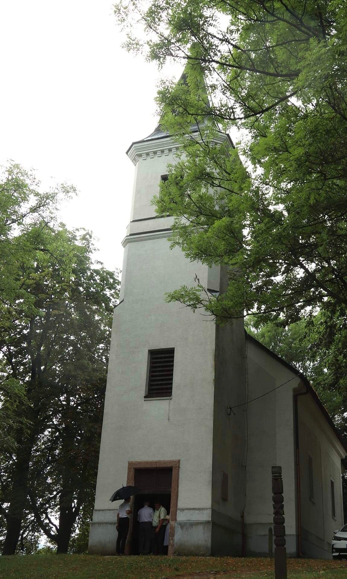 Katholische Pfarrkirche St. Kosmas und Damian